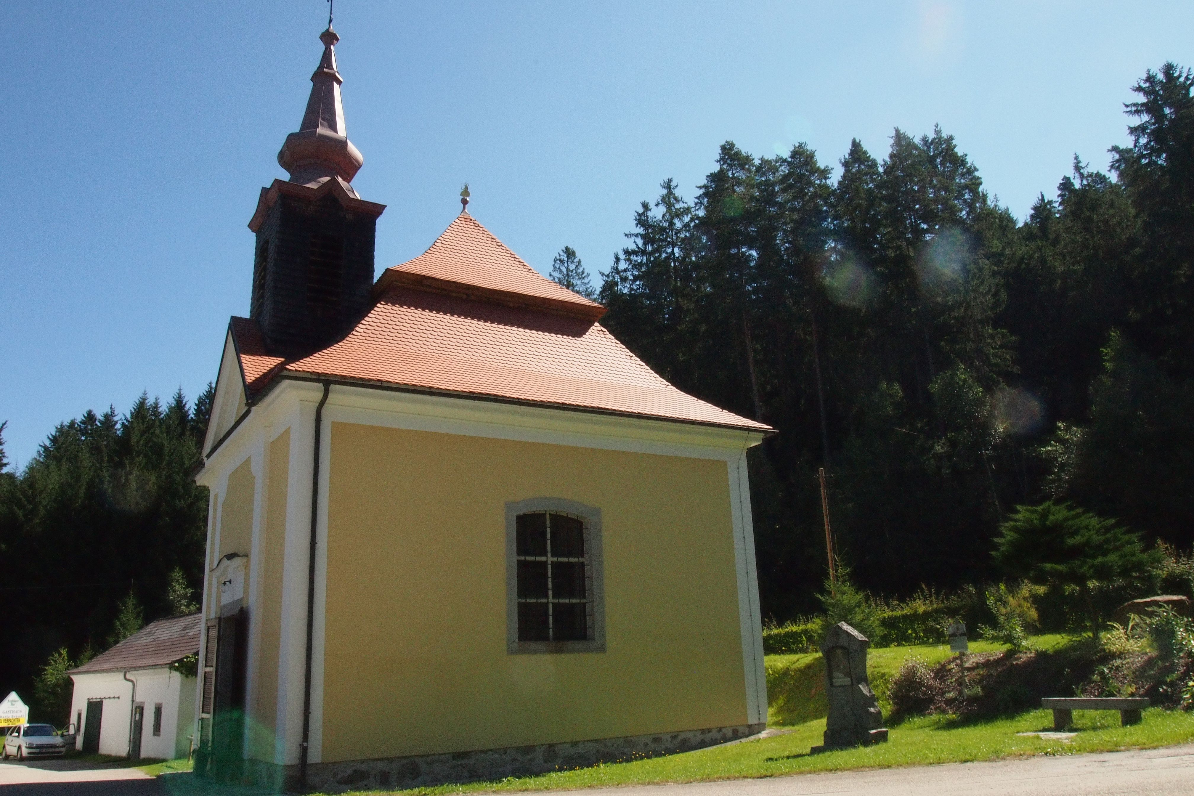 Church Maria Bründl